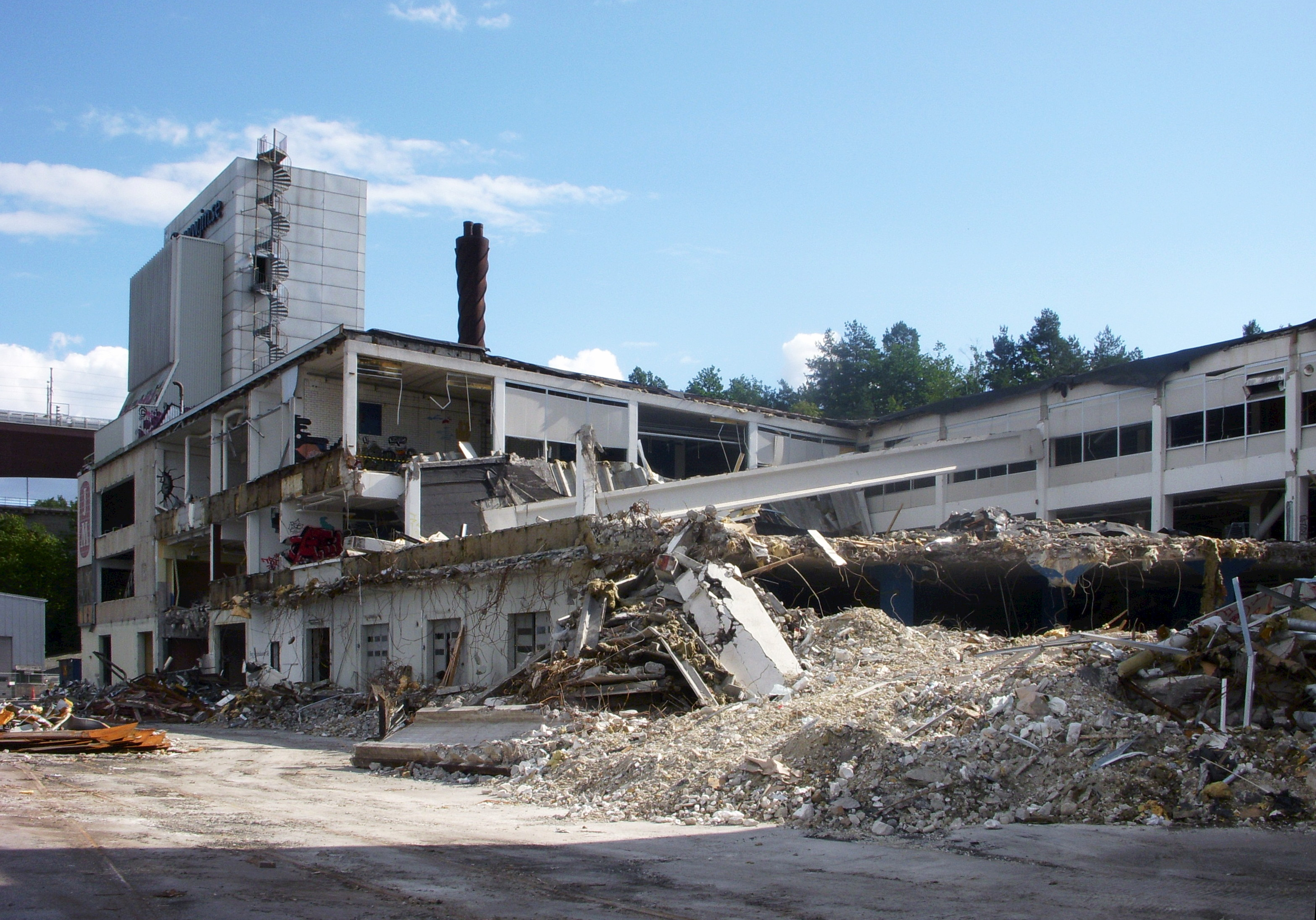 Rivnings- och byggnadsarbeten vid Liljeholmskajen i augusti 2008